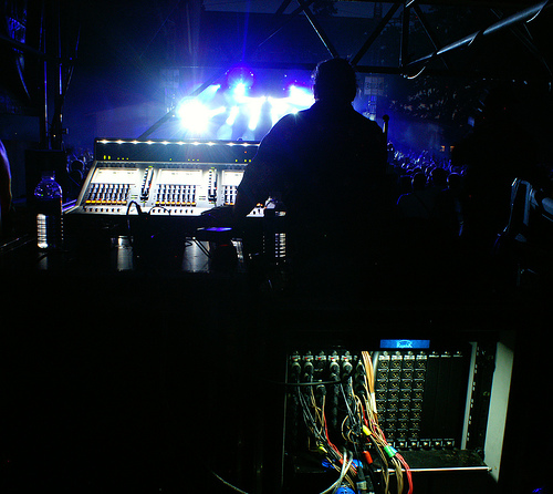 Concert de Tryo au Festival Aux Zarbs (Auxerre, France) 2007, vu depuis la régie son